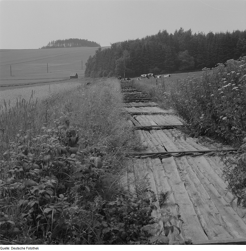 Original image description from the Deutsche Fotothek Freiberger Revier: Kunstgraben - Silbergraben - südlich von Großhartmannsdorf im Dörnthal